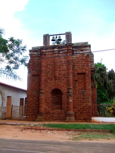 Campanario al lado de la Iglesia Virgen de Loreto, en Santa Rosa (Paraguay).